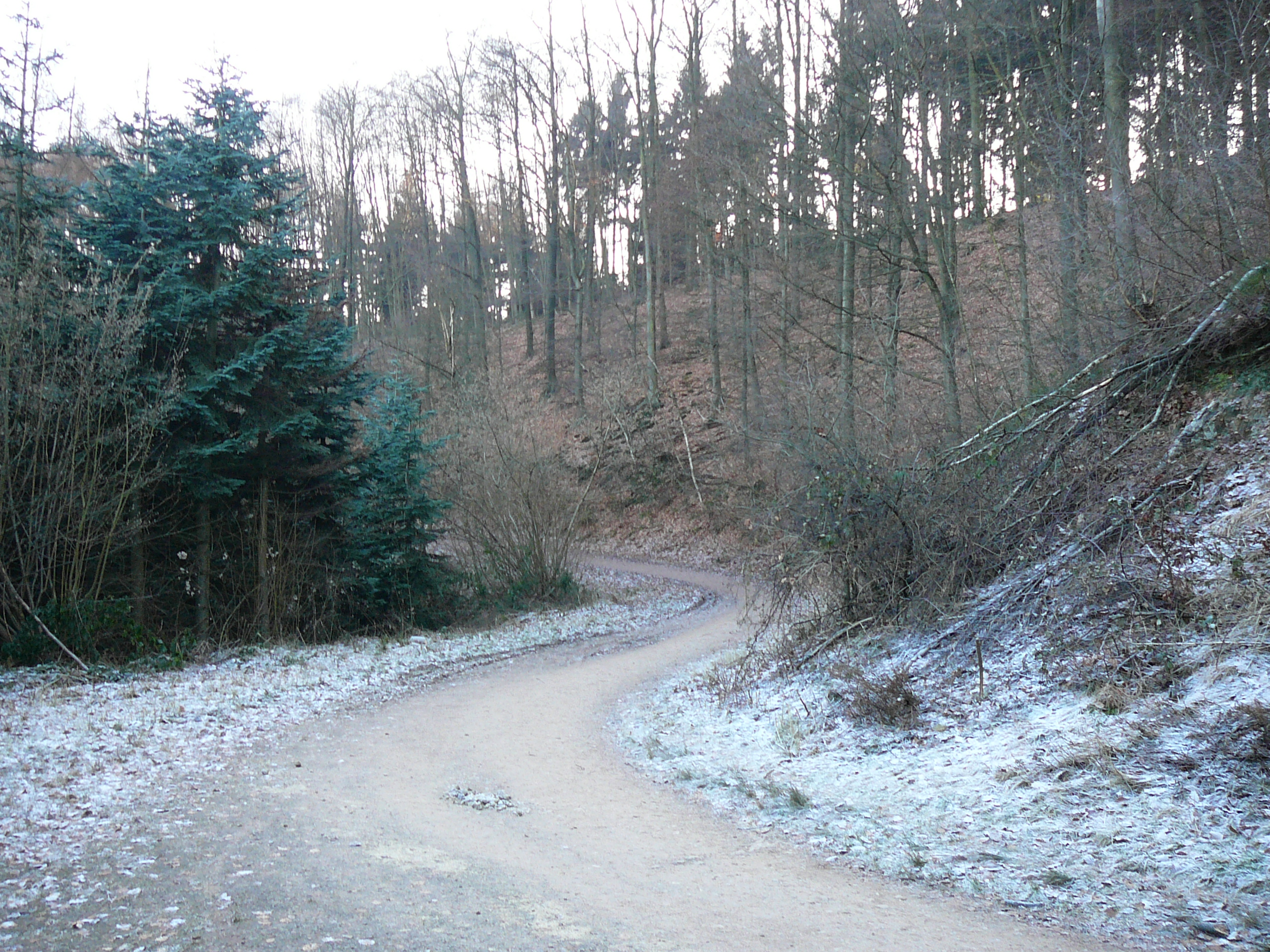 Boltenheide, Wuppertal